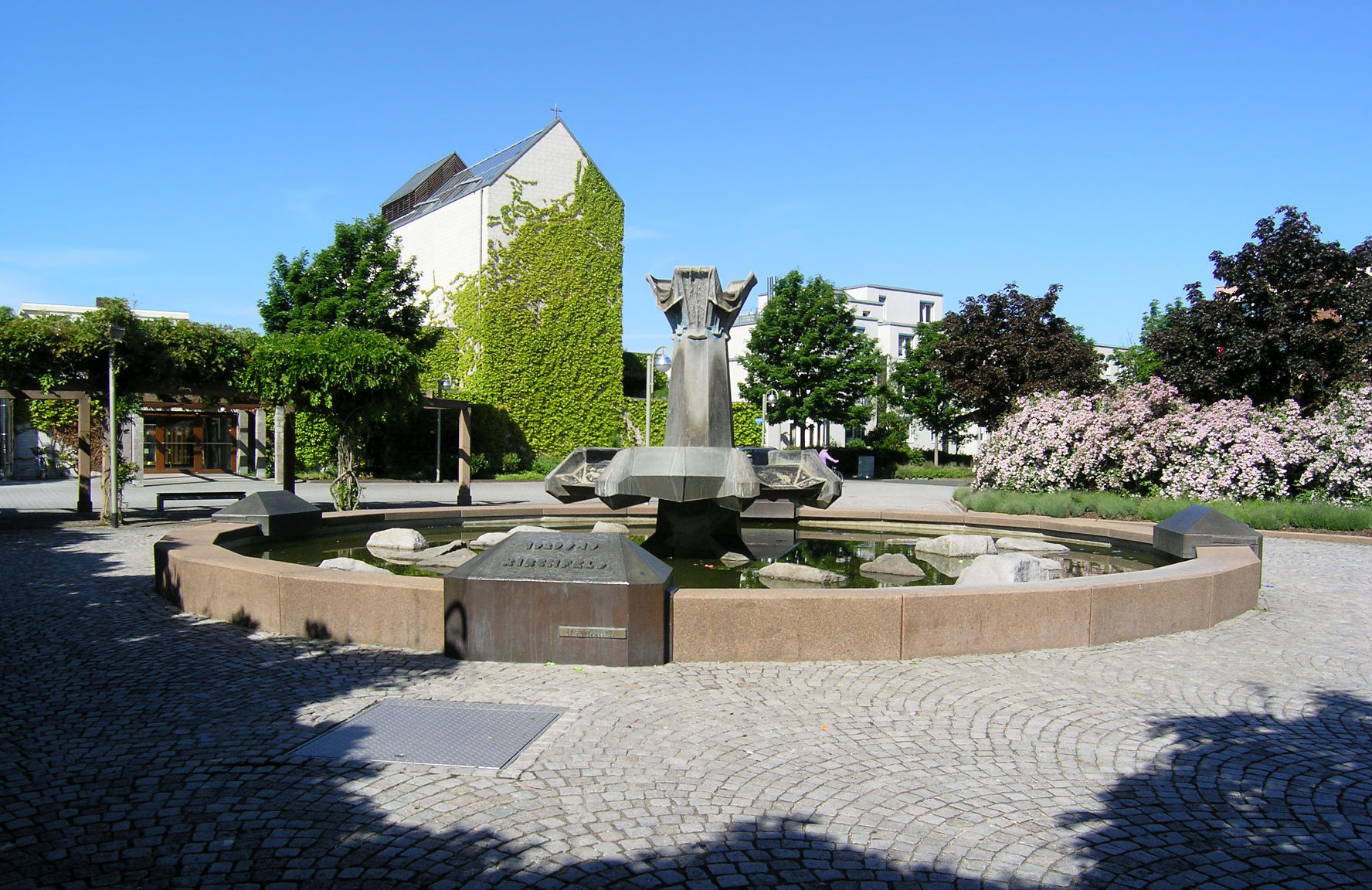 Karlsruhe-Neureut, Neureuter Platz mit Kirche St. Judas Thaddäus von Ottokar Uhl